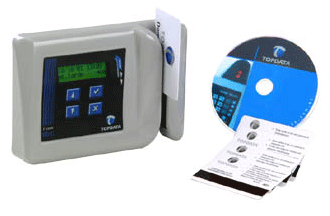 This image was copied from pt. The original description was: relógio de ponto usando cartões magnéticos Descrição Modelo de relógio de ponto utilizando cartões magnéticos Licença